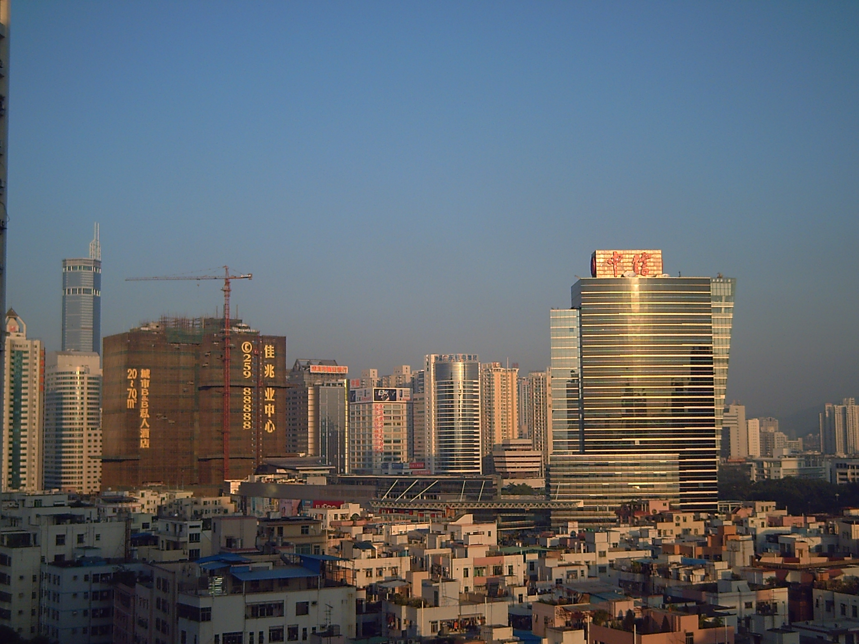 華強北建築群 -Jack Chui 04:54:51 2005年11月4日 (UTC)